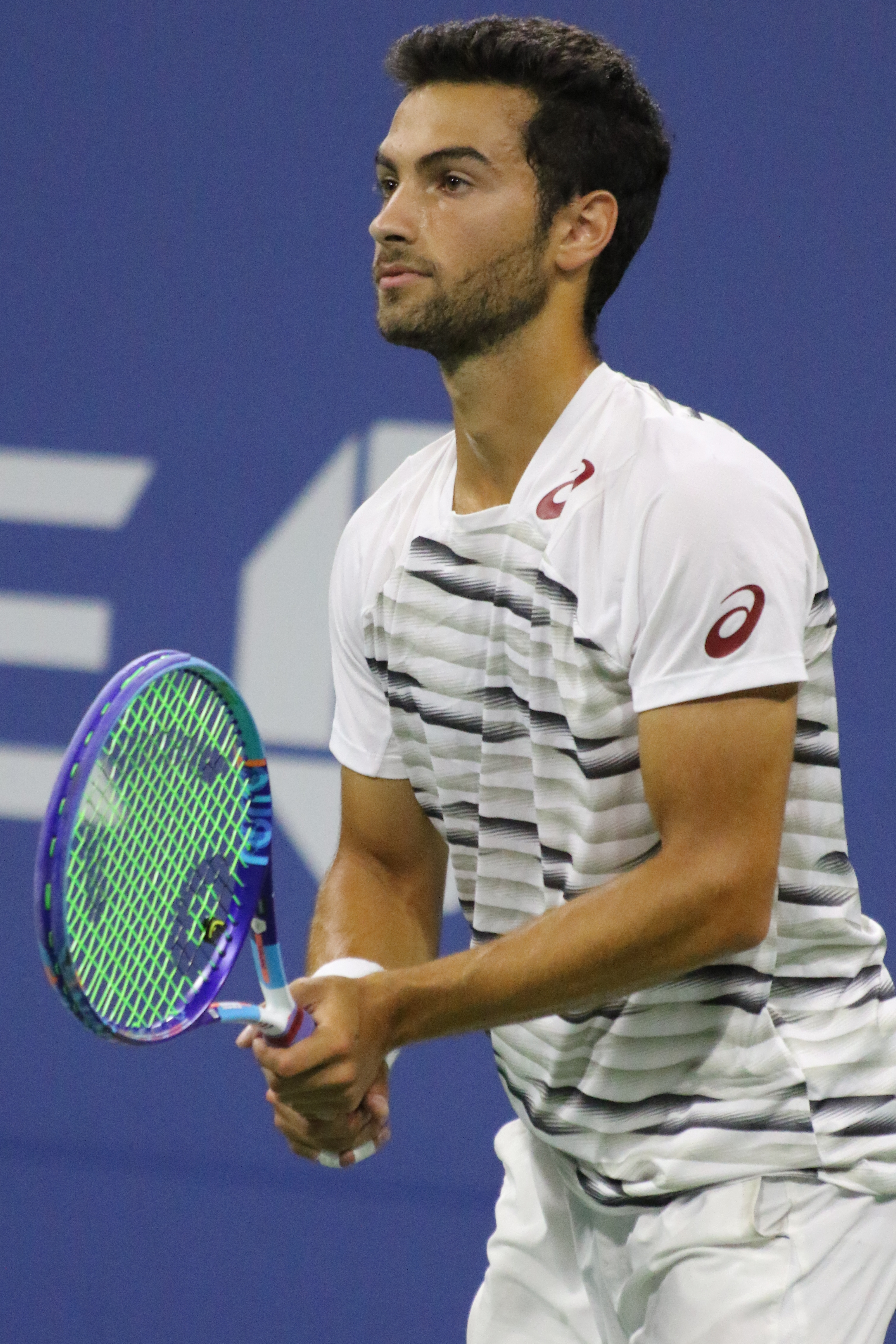 Rubin US16 (53)